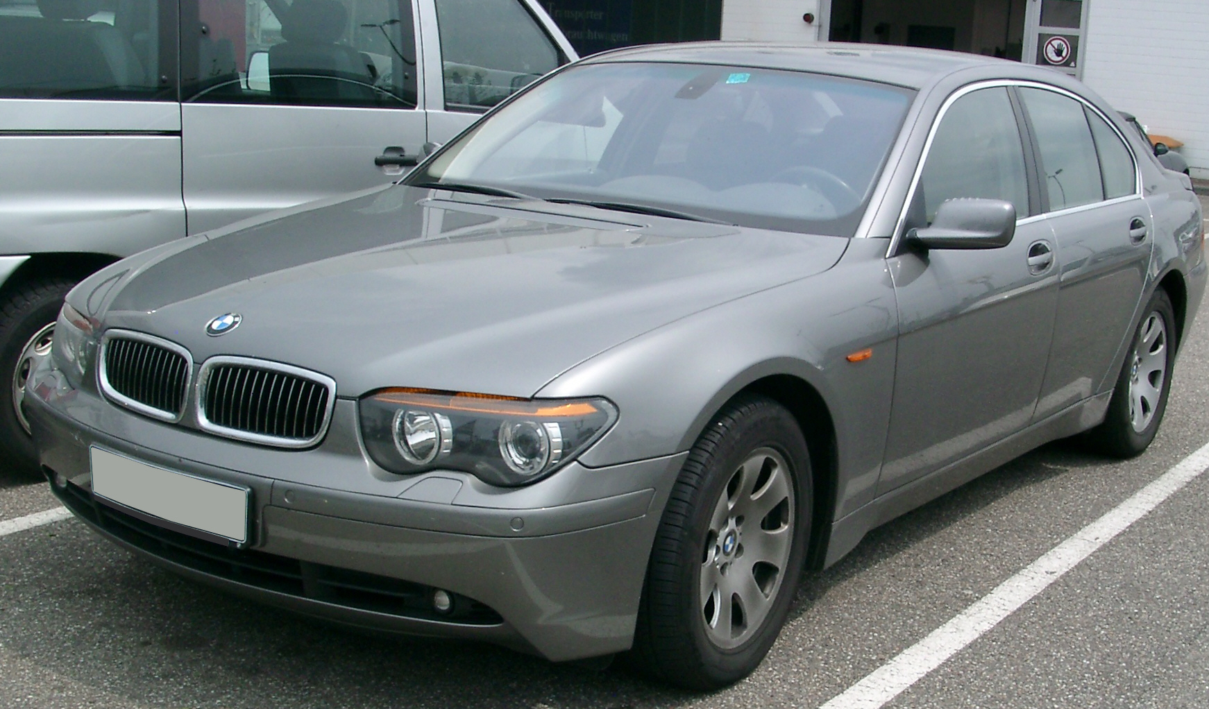 BMW E65